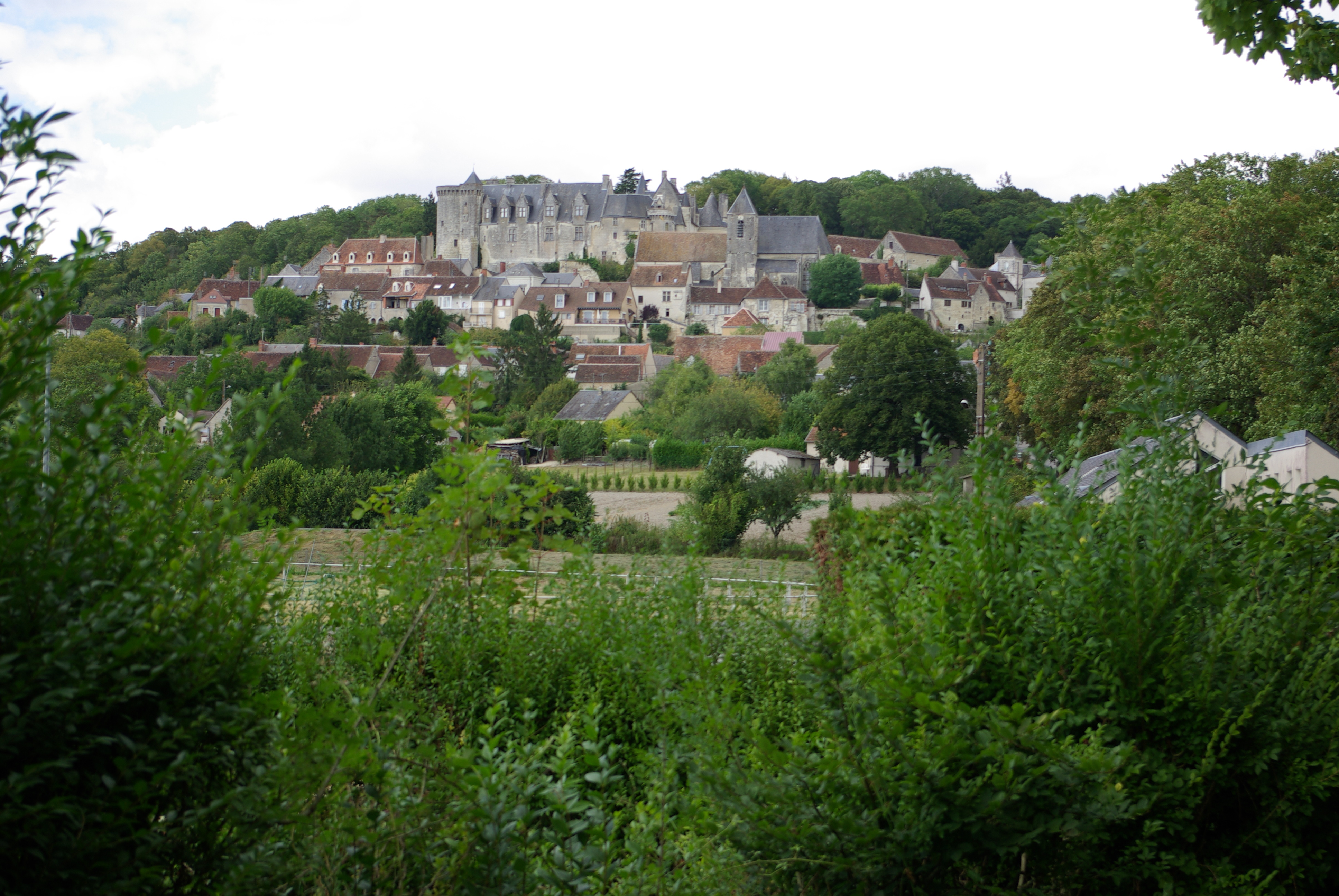 Vue générale du château de Palluau-Frontenac. .